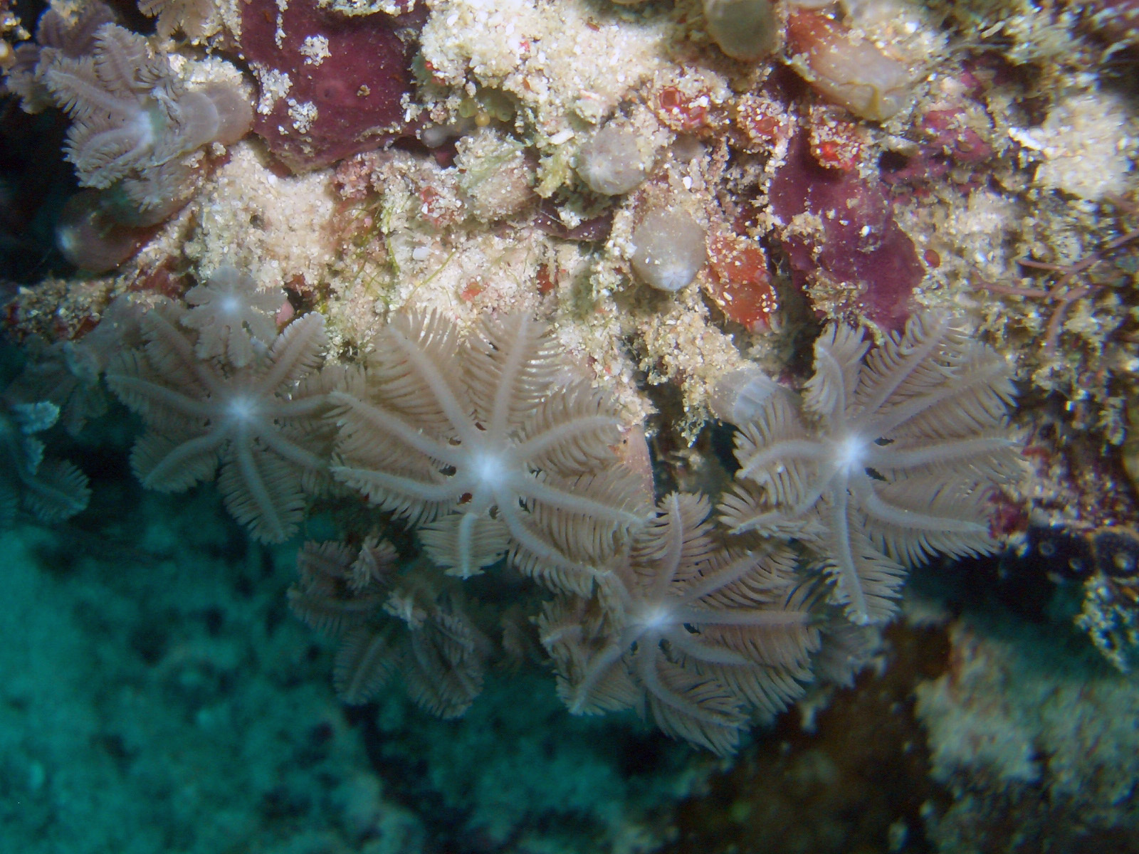 Clavularia sp. ?